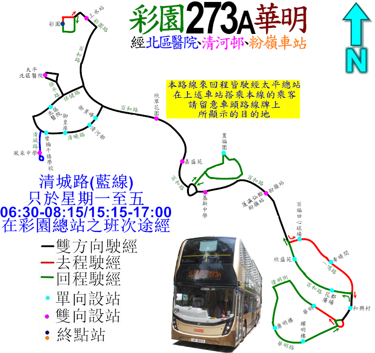 中文（香港）: 九巴273A線的走線圖